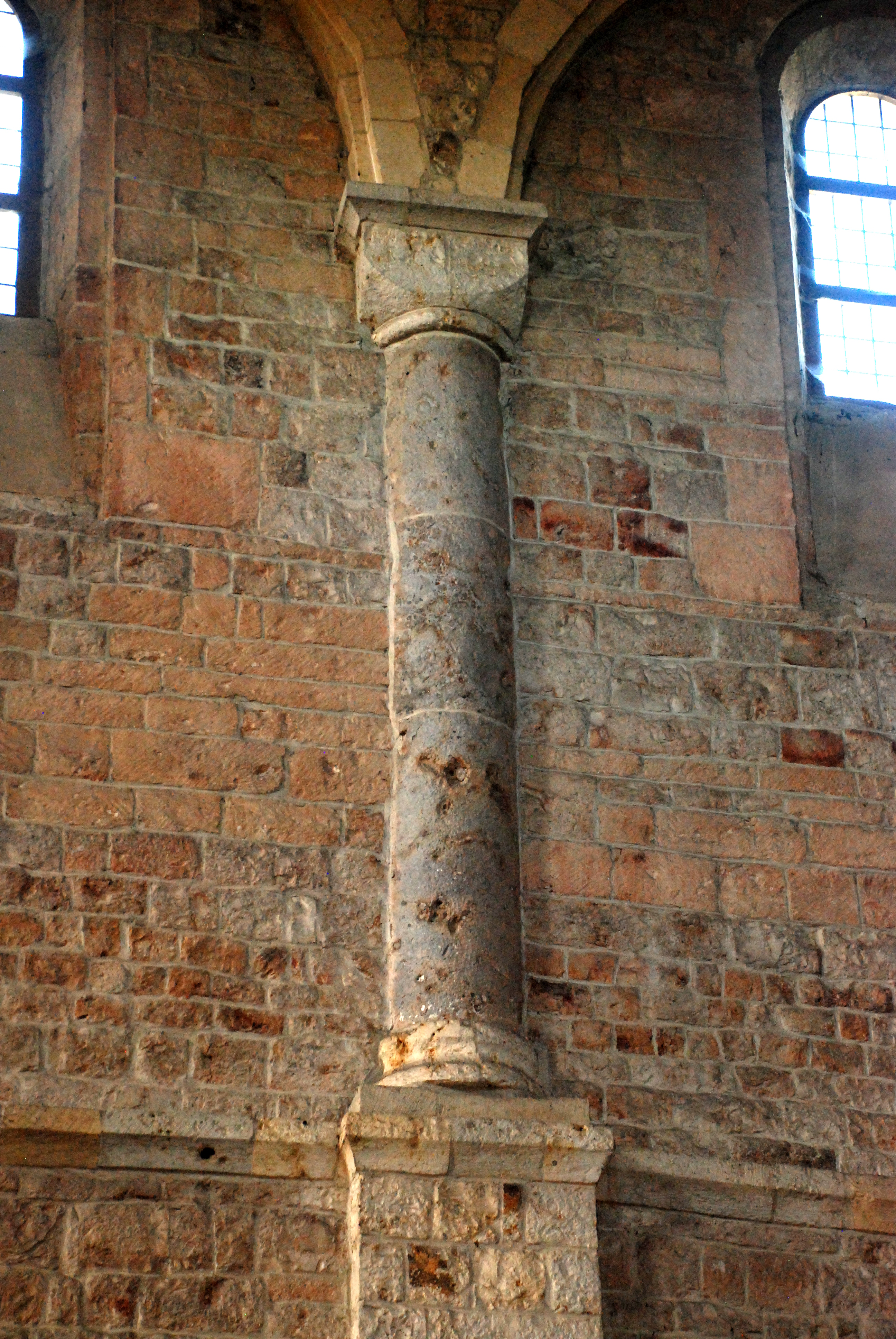 Belgique - Brabant wallon - Église Sainte-Adèle-et-Saint-Martin d'Orp-le-Grand